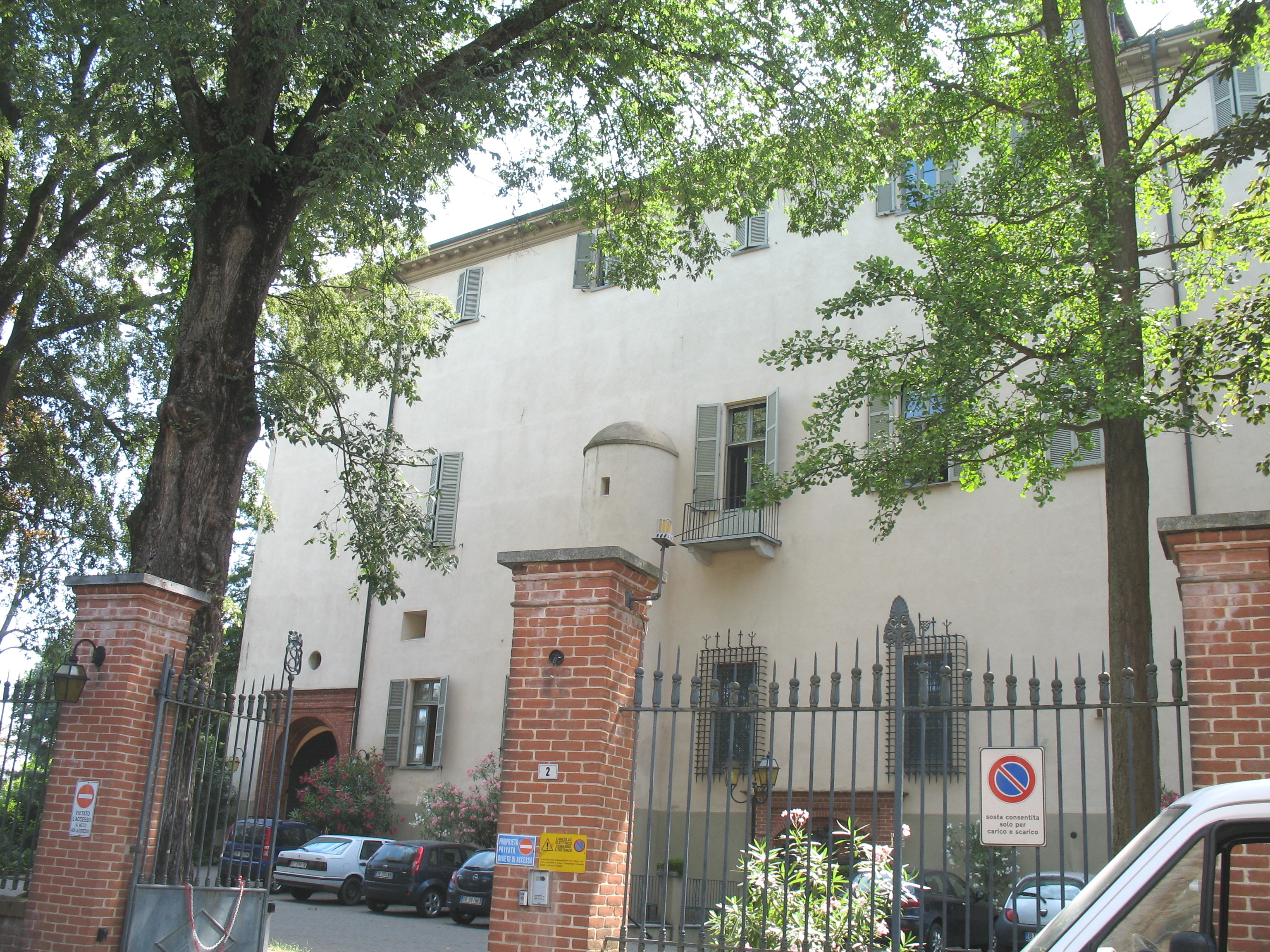 Palazzo Bricherasio a Fubine (Alessandria, italia), adibito a casa di riposo Opera "Don Orione"